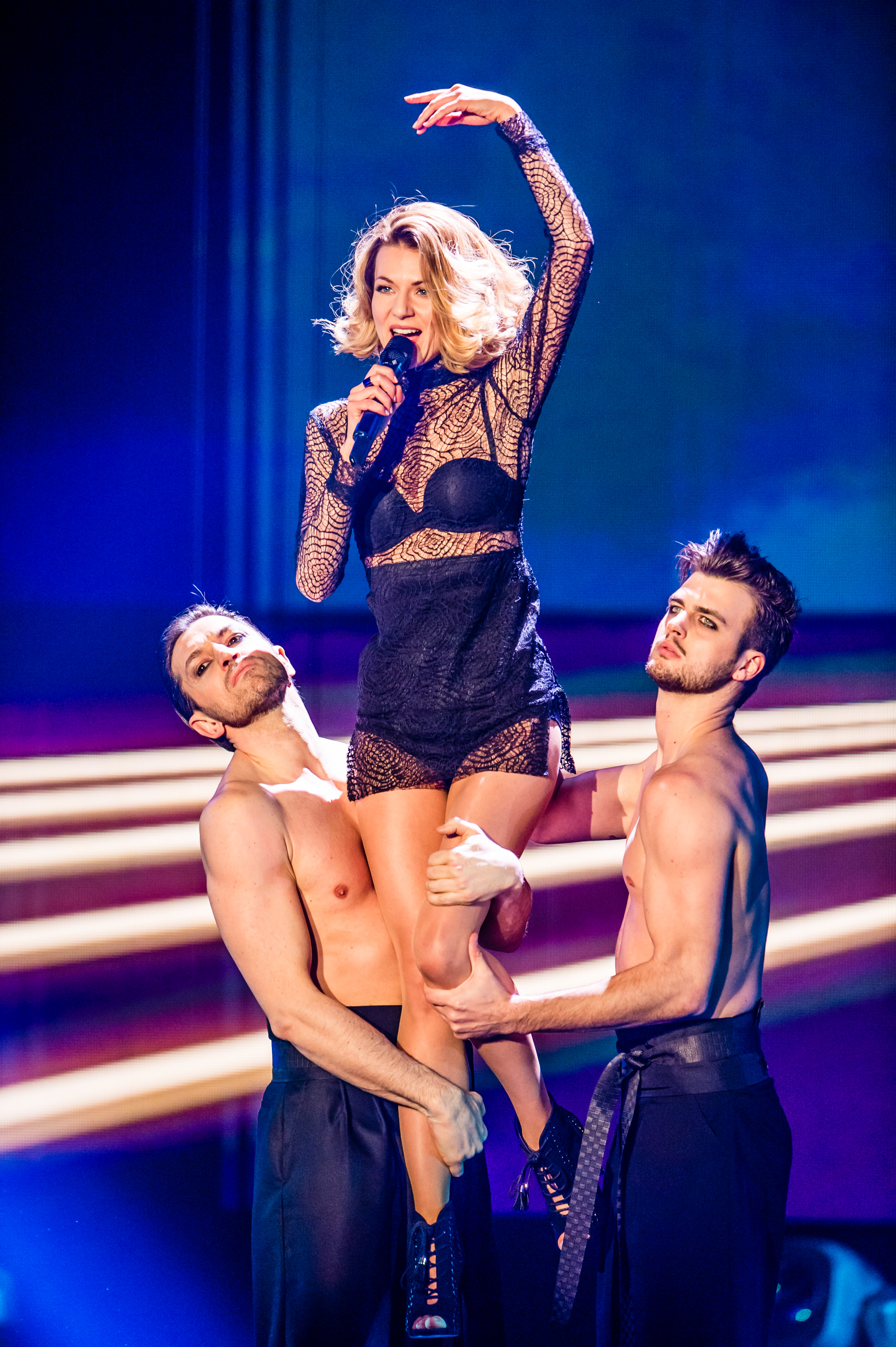 Eurovision Song Contest 2016 - Unser Lied für Stockholm - Ella Endlich